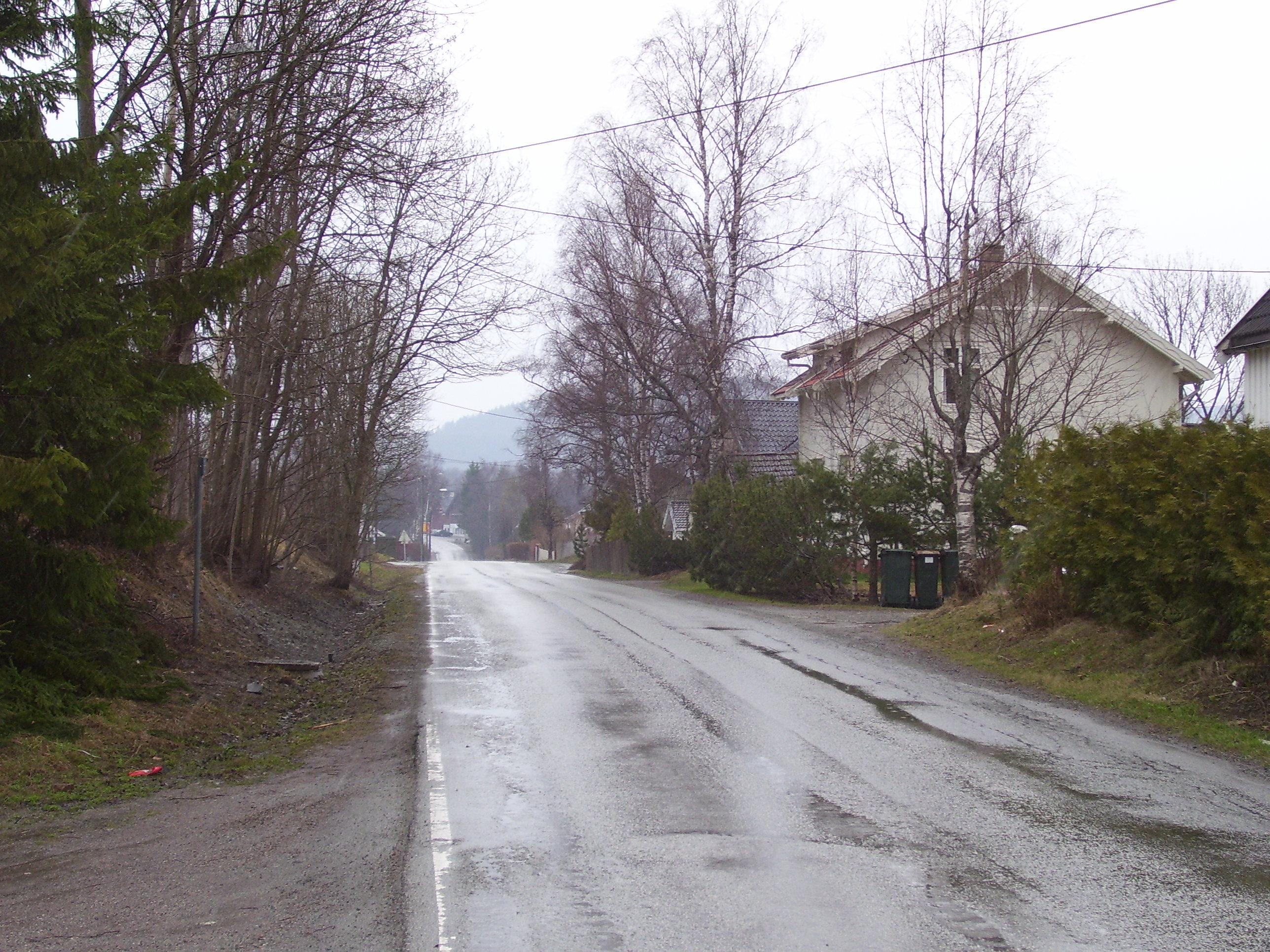 Parti fra Spikkestad i Røyken kommune